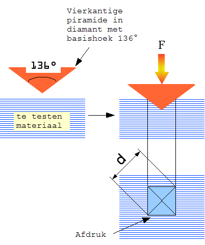 wiki fr door Romary GNU FDL. zelf vertaald